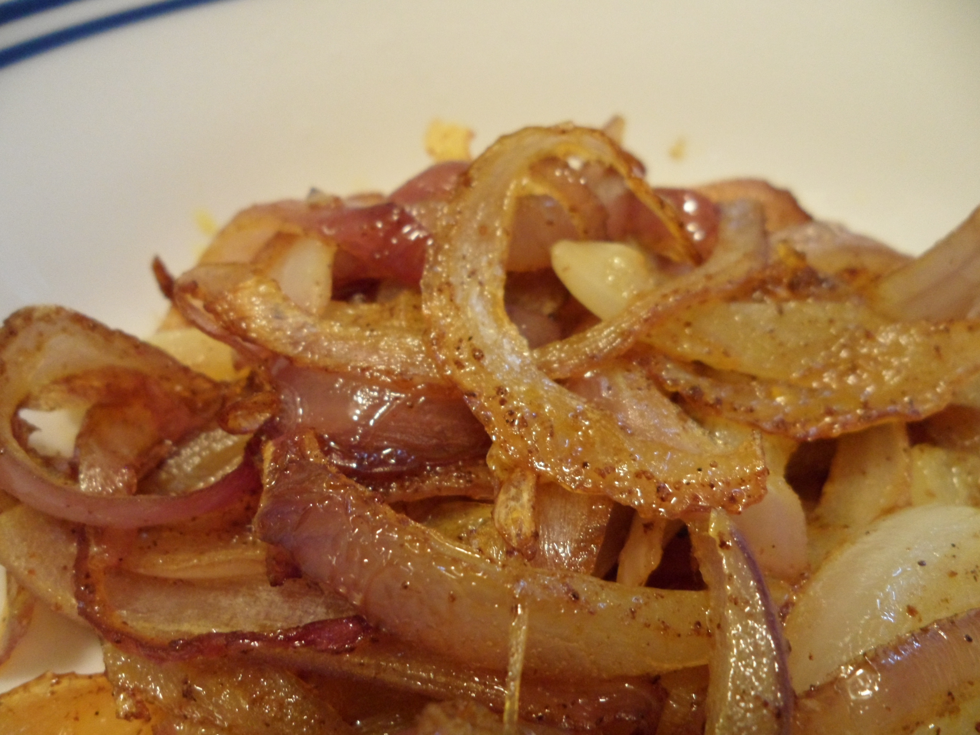 בצל מטוגן מתובל